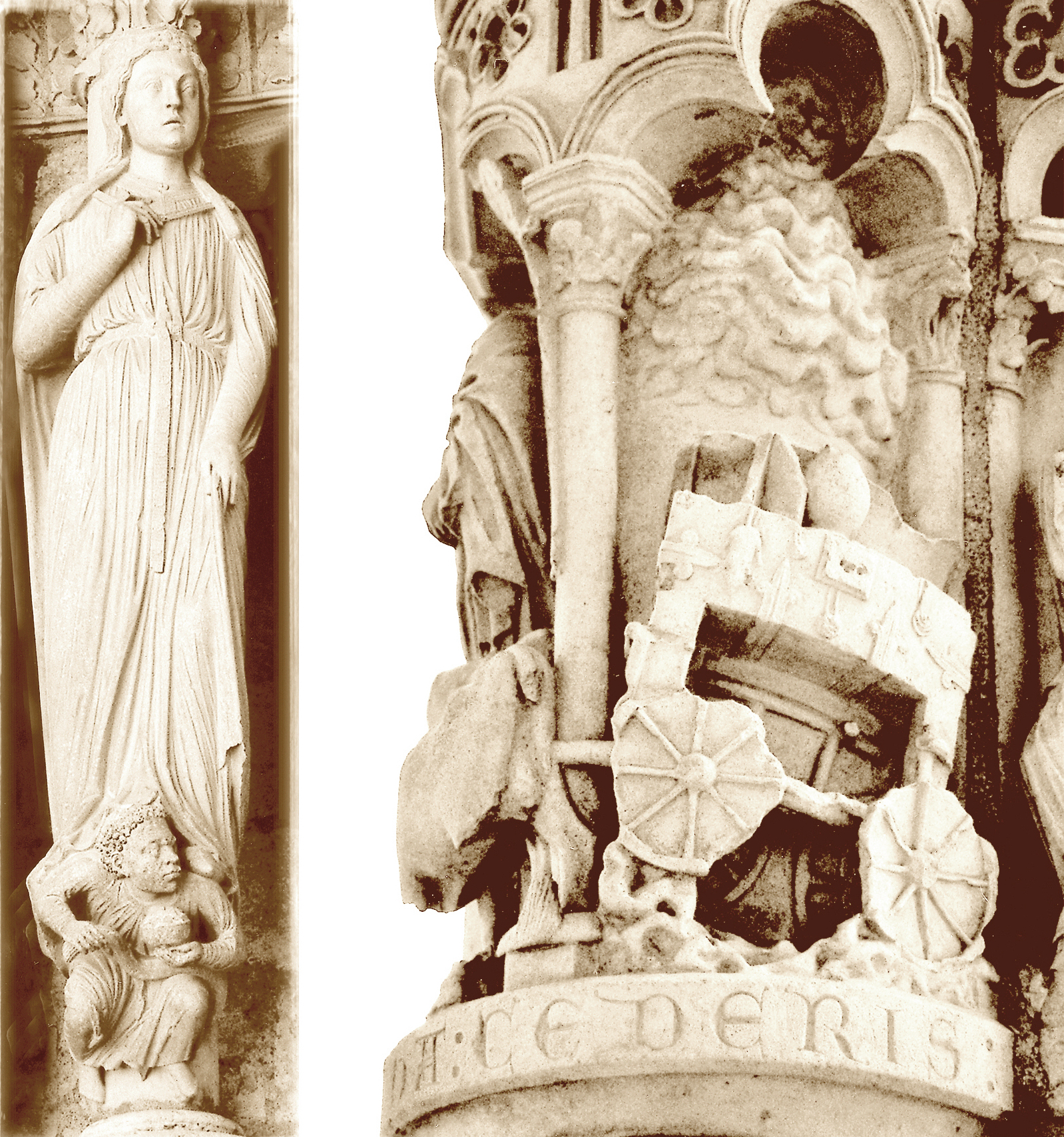 Königin von Saba und Archa cederis am Nordportal der Kathedrale von Chartres, Frankreich